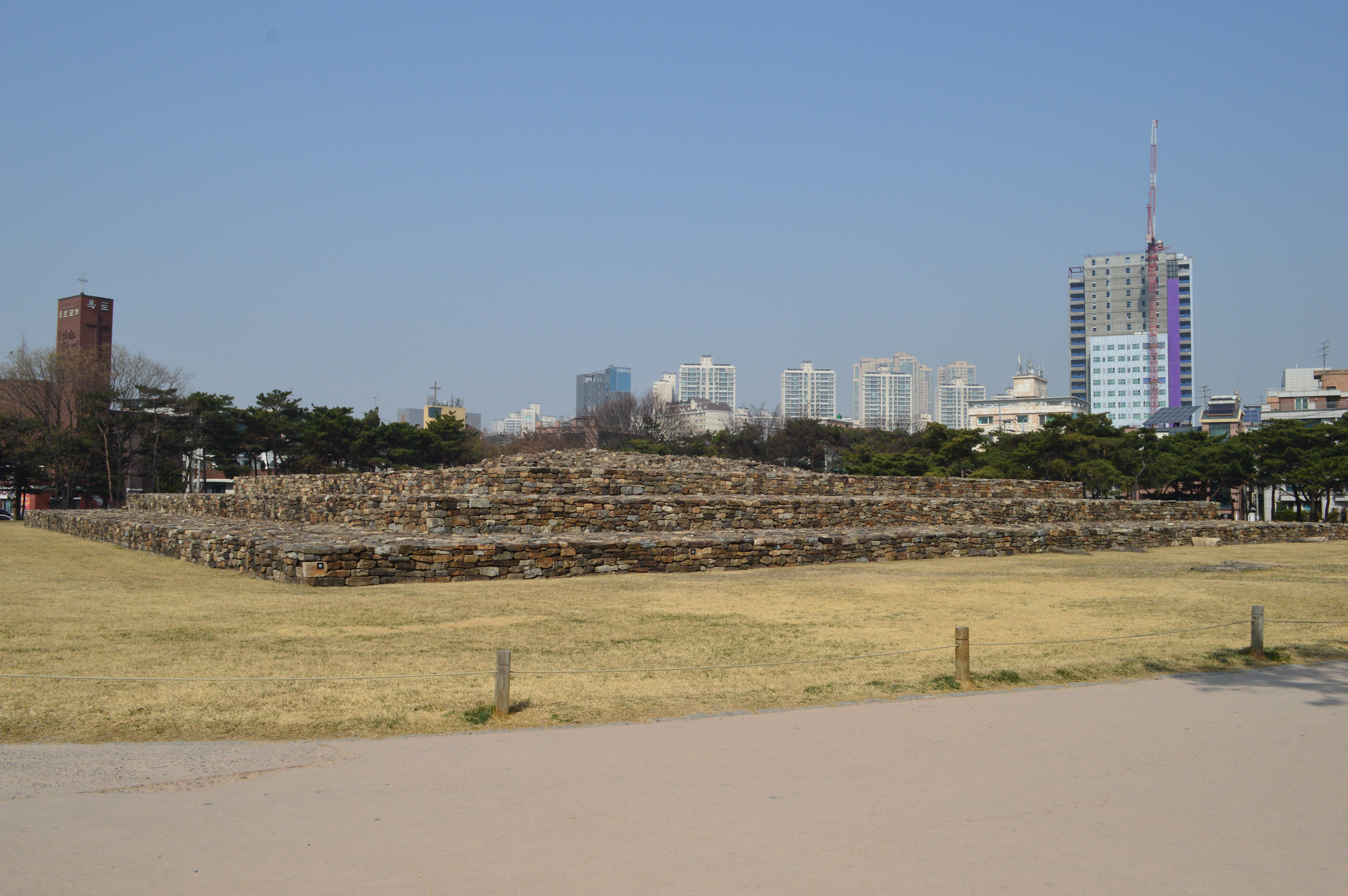 ソウル石村洞3号墳 全景